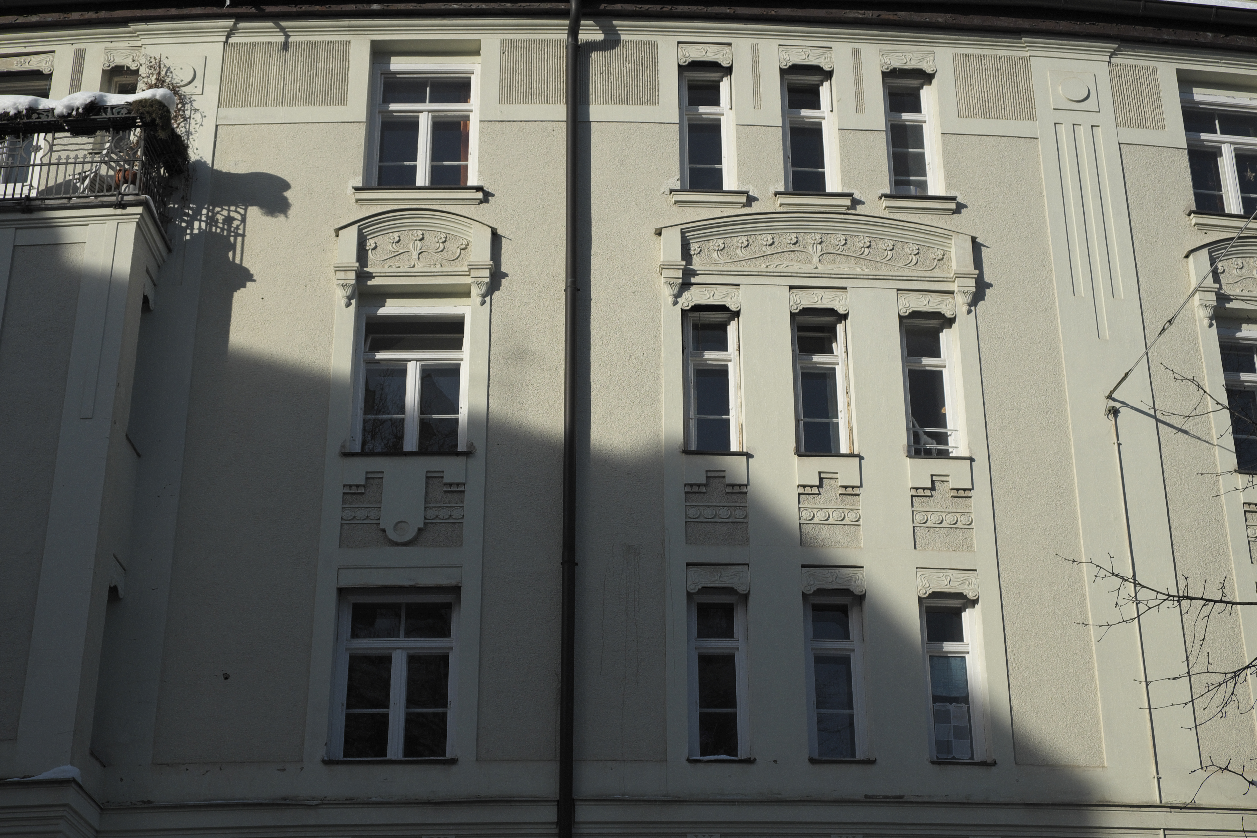 Mietshaus in der Metzstraße 37 in Haidhausen im Stadtbezirk Au-Haidhausen in München (Bayern/Deutschland), Anfang 20. Jahrhundert